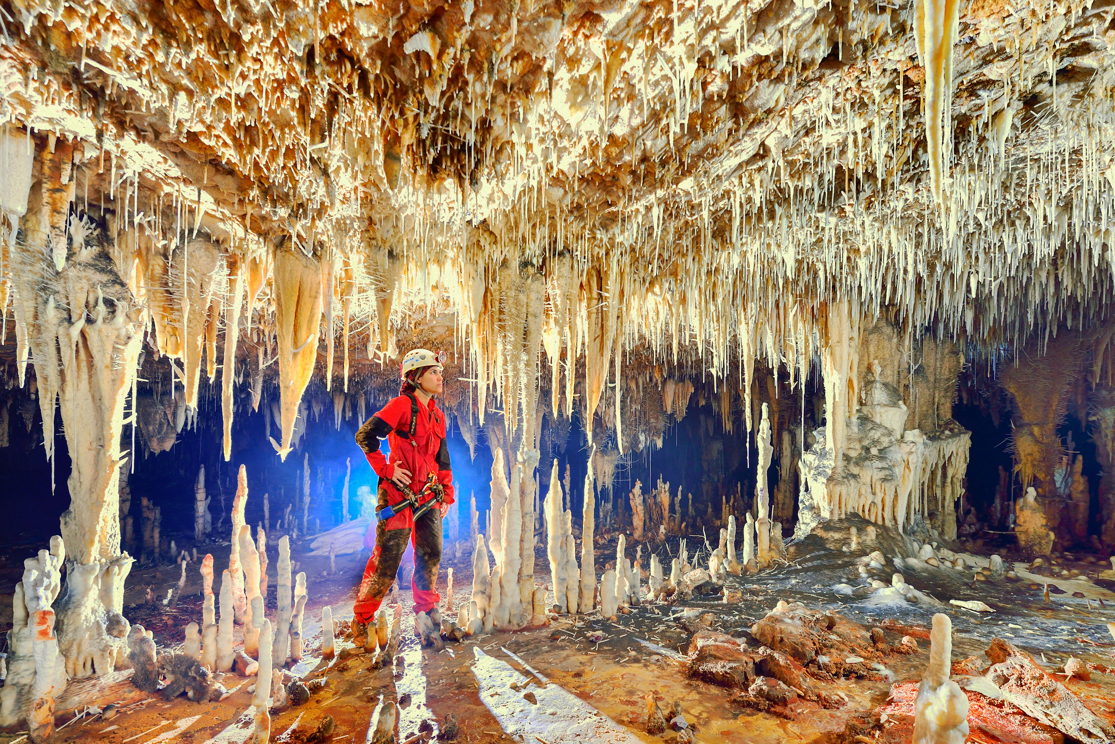 Catedral I Salão da Floresta Branca na Lapa do Bezerra São Domingos, Goiás, Brasil